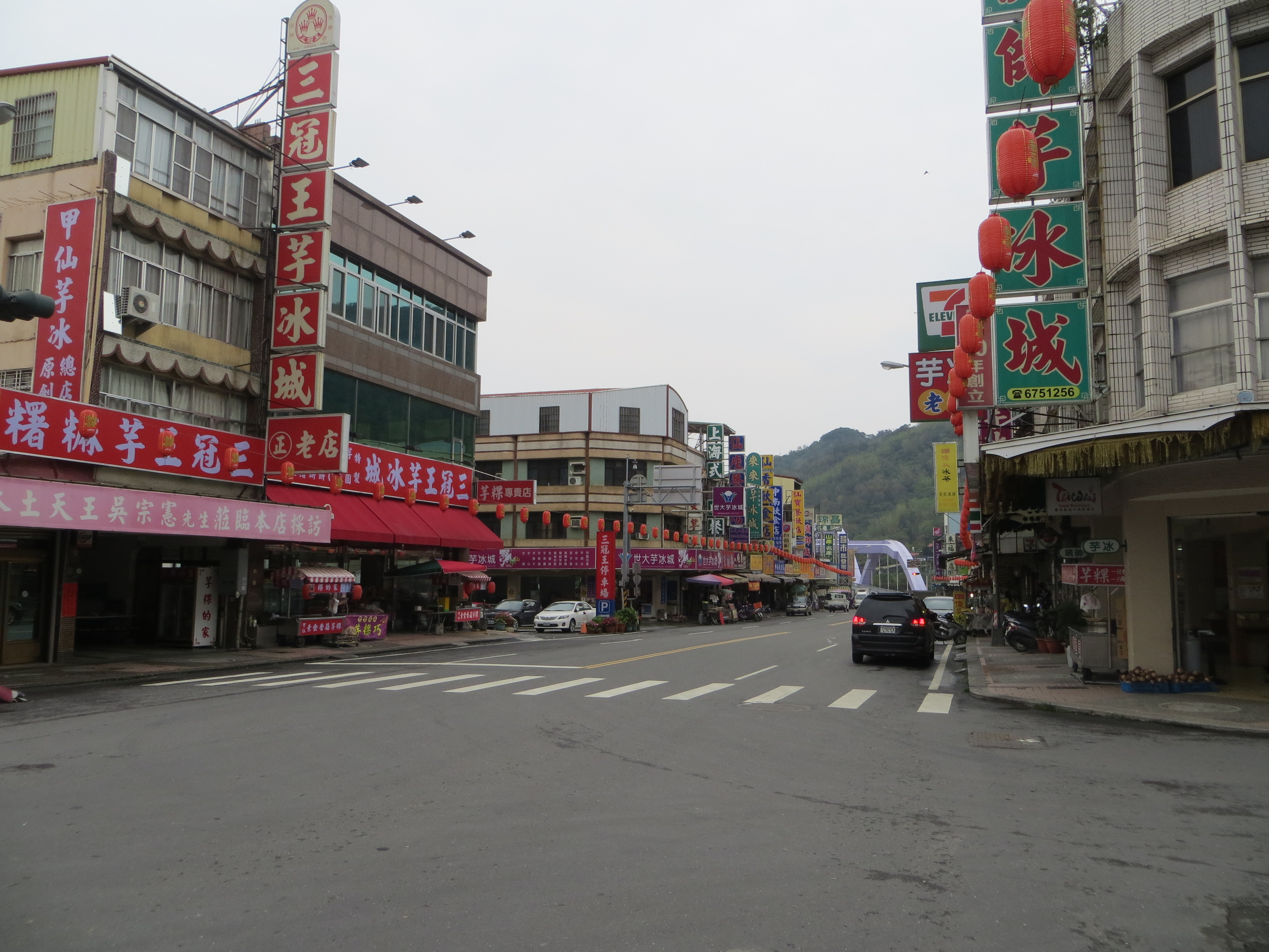 南橫公路行經甲仙一景，圖為朝寶來方向攝。2013年4月6日